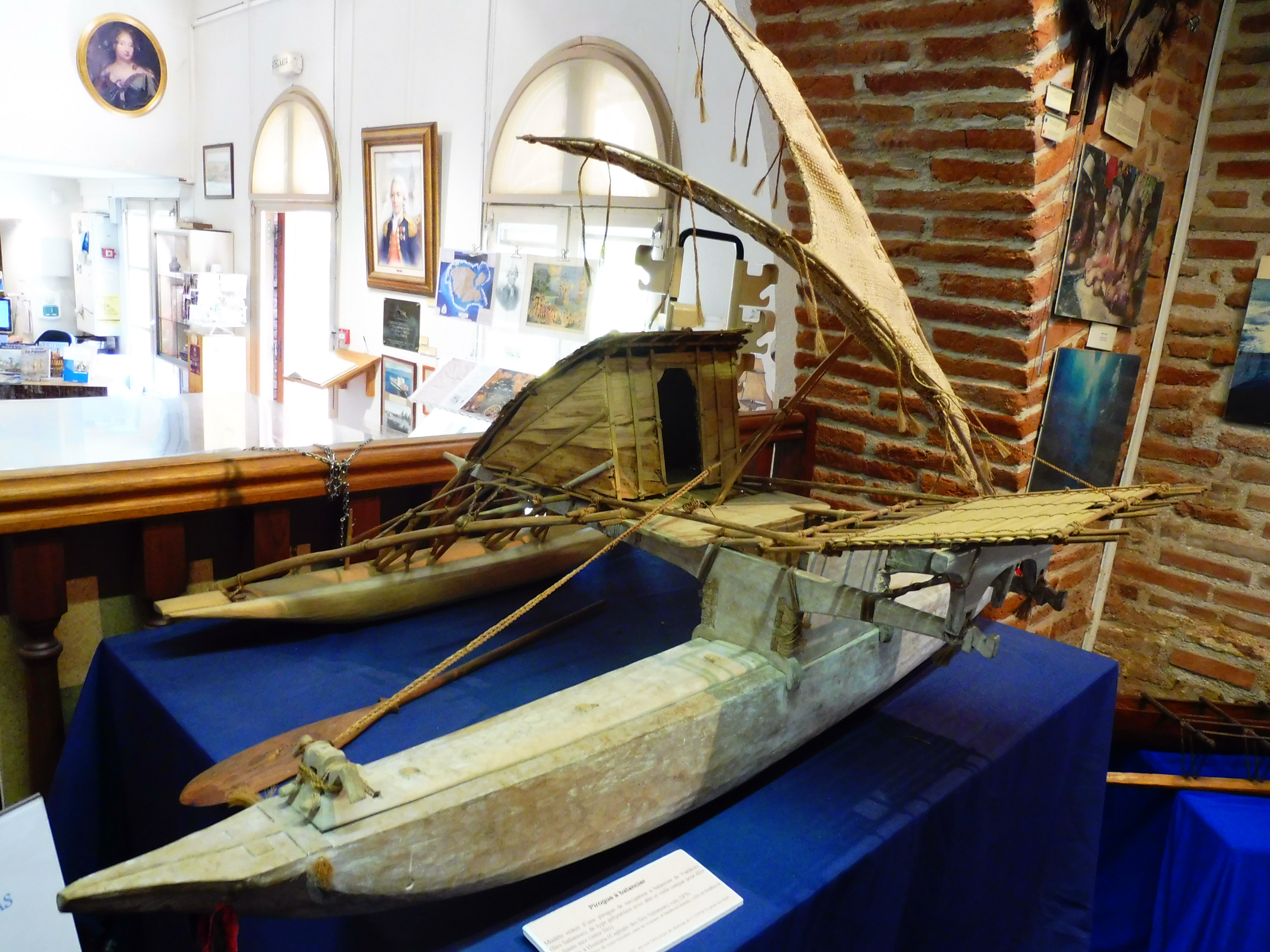 Pirogue à balancier de Vanikoro de type ploynésien avec abri et voile, conçue pour aller en haute-mer : cordages en fibre de coco tressées, case en roseaux et bambous tressés, voile en feuilles de pandanus tressées. Musée Lapérouse, Albi.